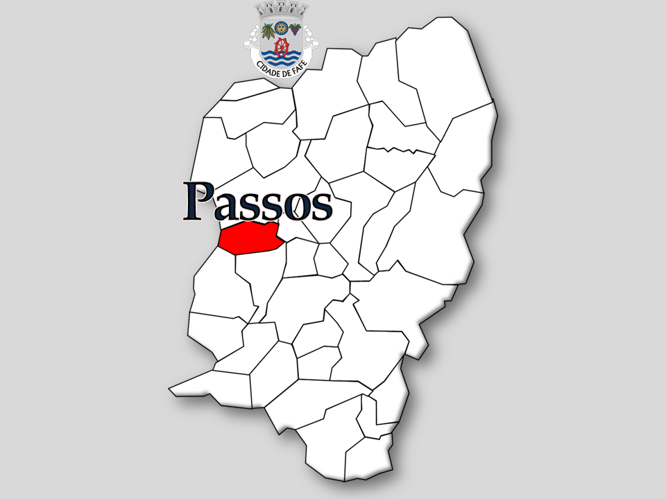 Censos 1864/2011